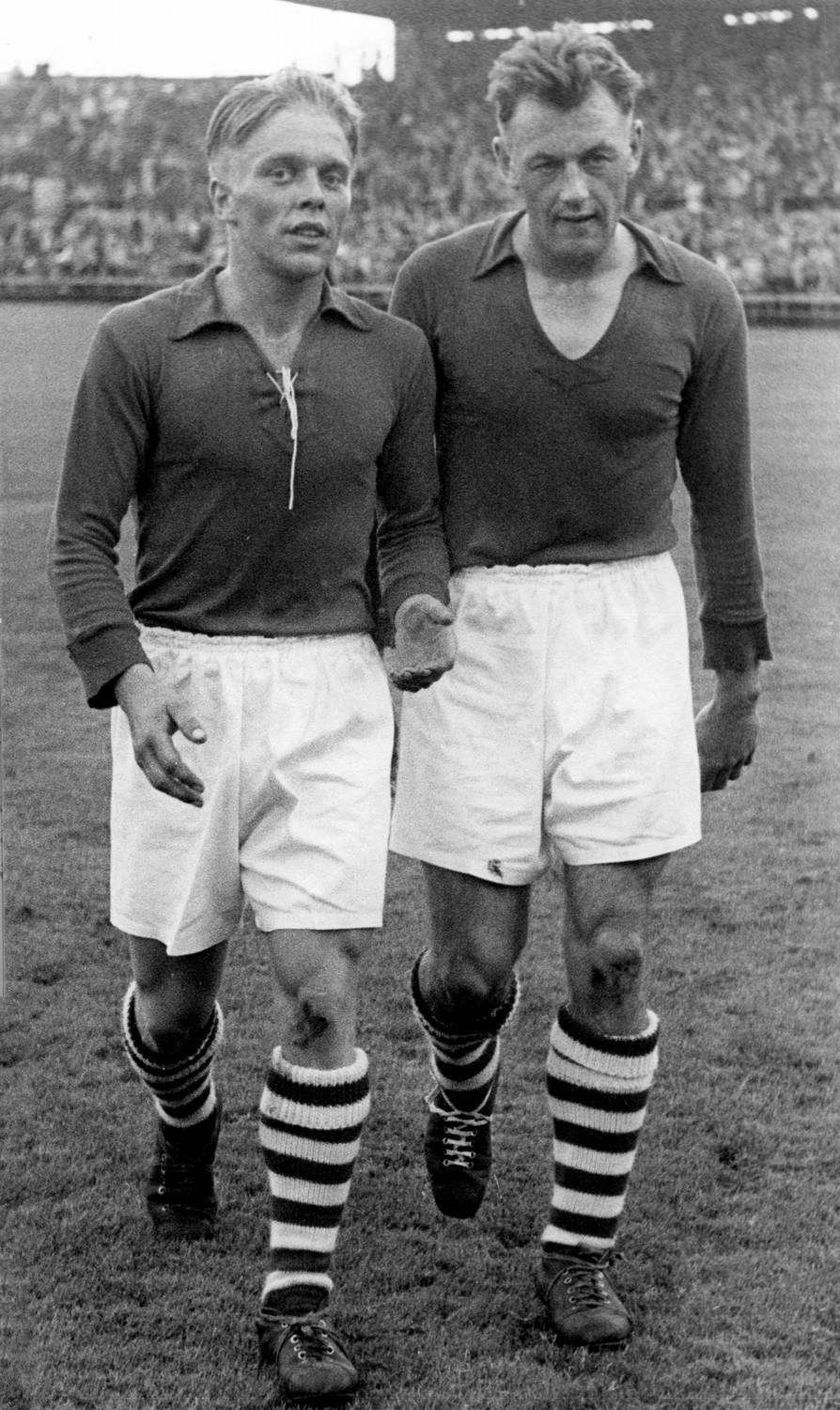 Bent Sørensen (right)